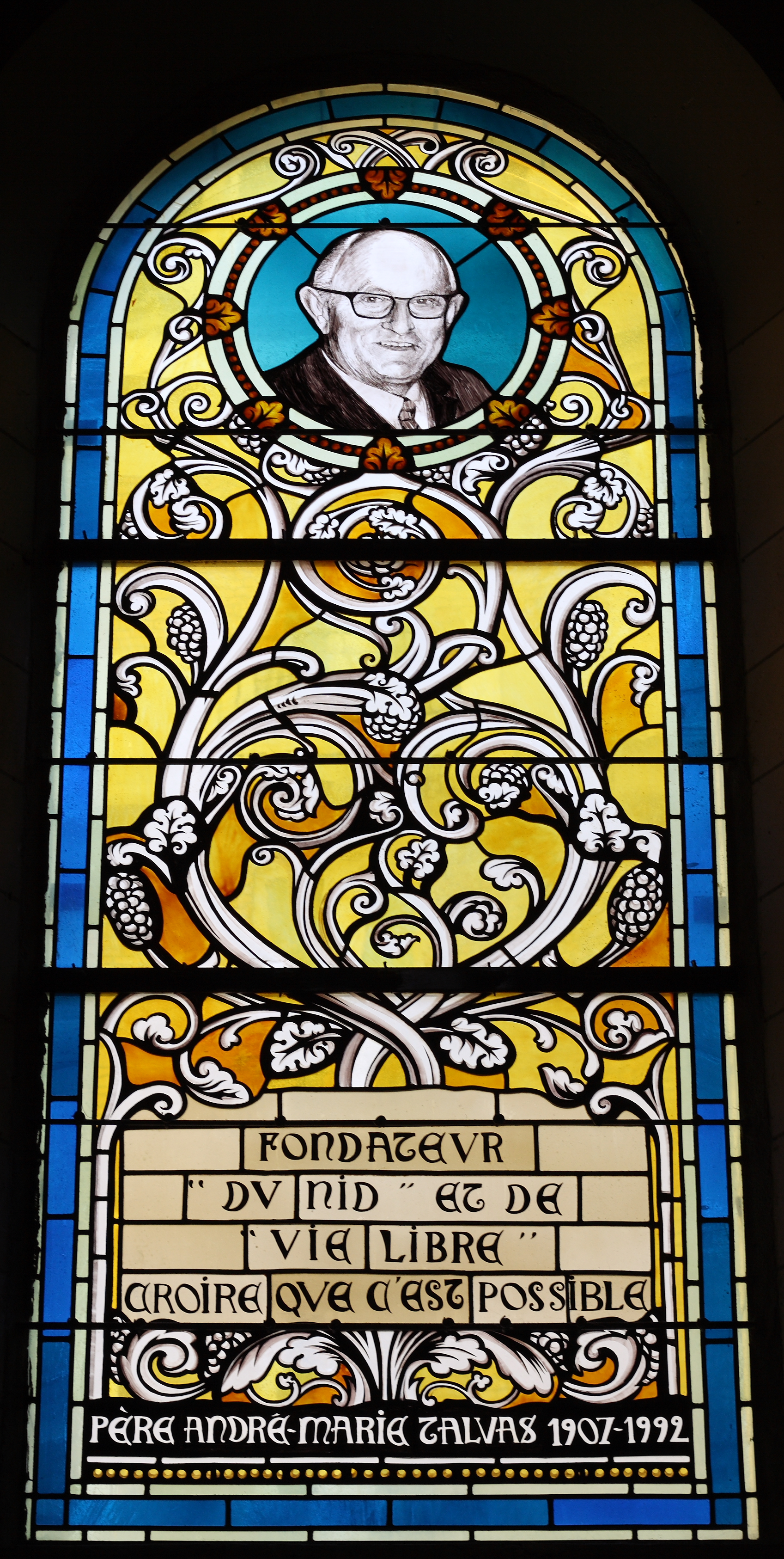 Bleiglasfenster in der katholischen Pfarrkirche Saint-Vincent-de-Paul in Clichy, Inschrift: "Père André-Marie Talvas 1907-1922"